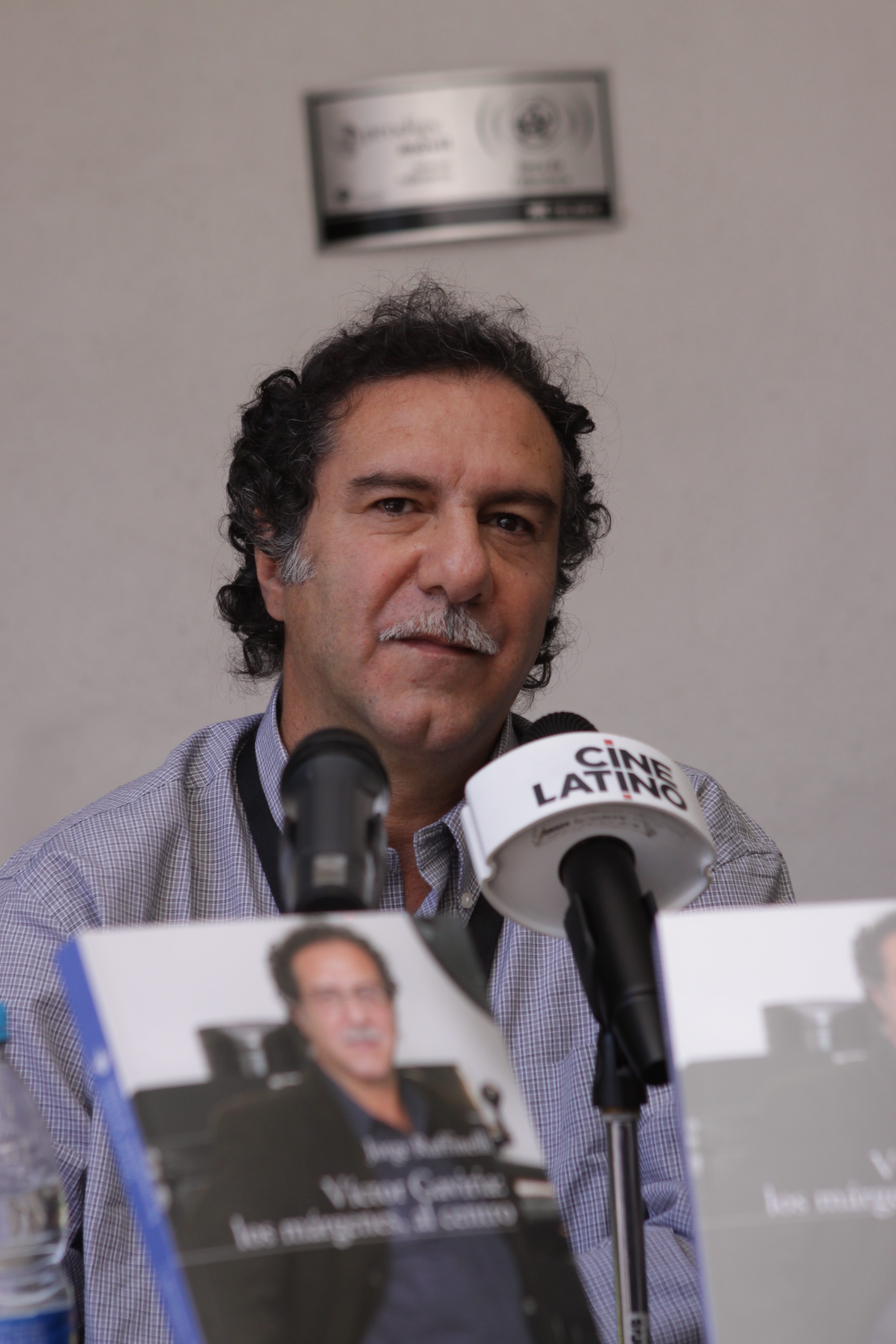 21/03/09 Victor Gaviria durante la presentación del libro Victor Gaviria, los Márgenes del Centro escrito por Jorge Rufinelli